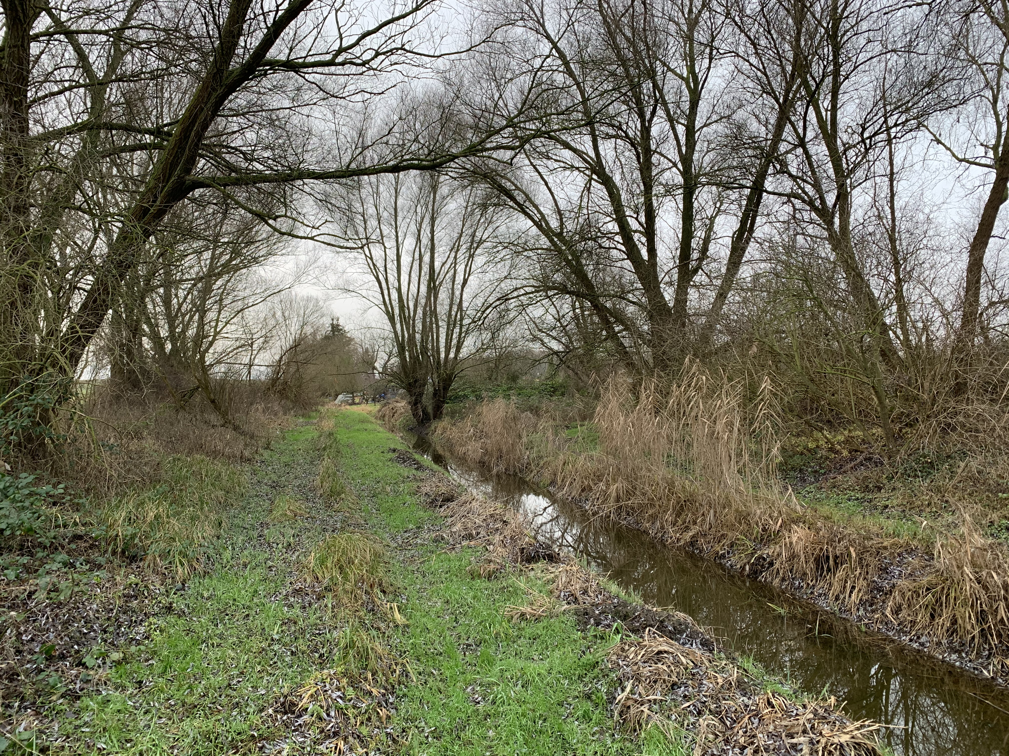 Stadtsee in Strasburg (Uckermark) in Brandenburg